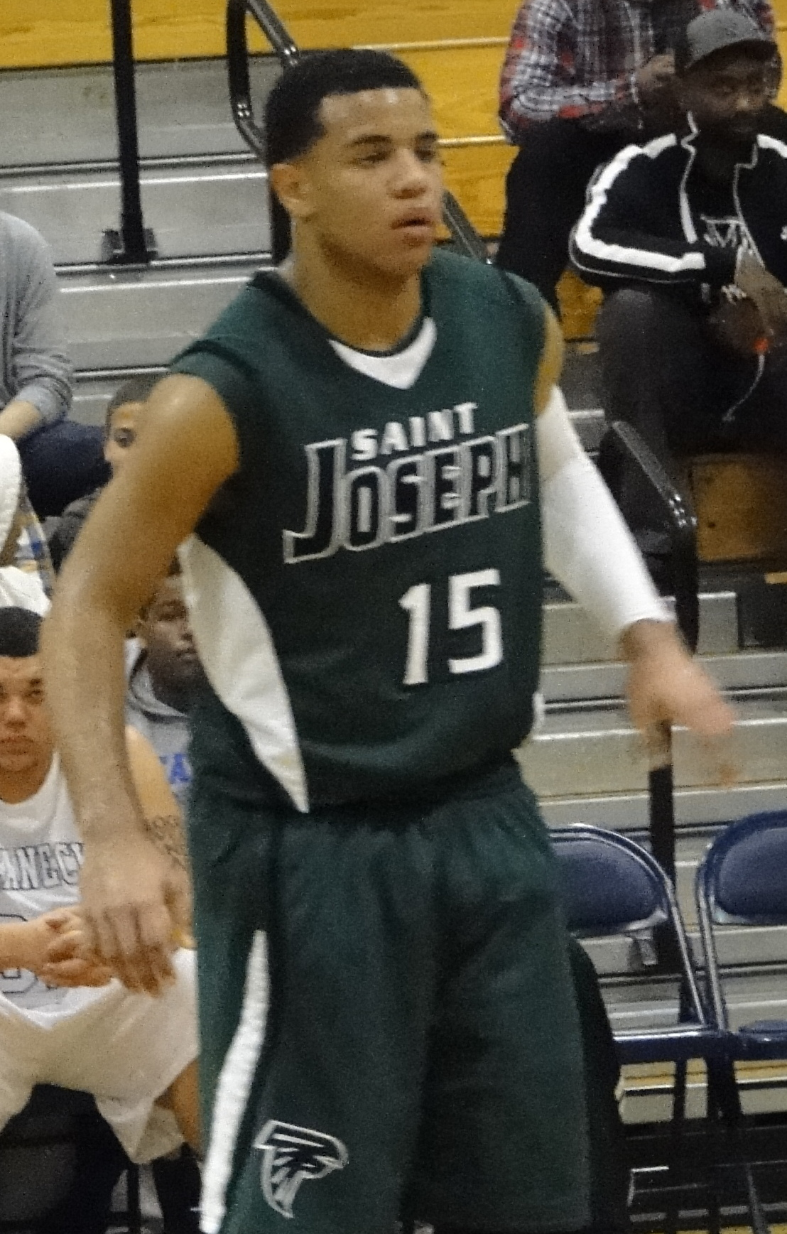 Marques Townes